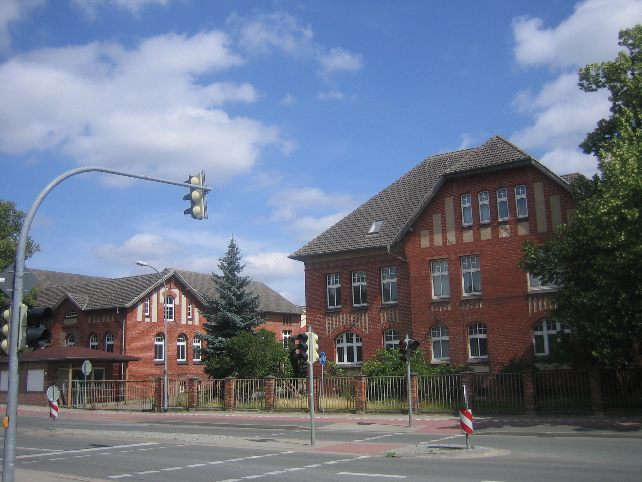 Elektrizitätswerk, Ihlenfelder Straße 88, Neubrandenburg, Mecklenburg-Vorpommern